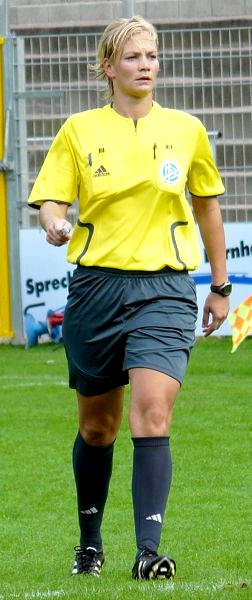 Bibiana Steinhaus FIFA Referee